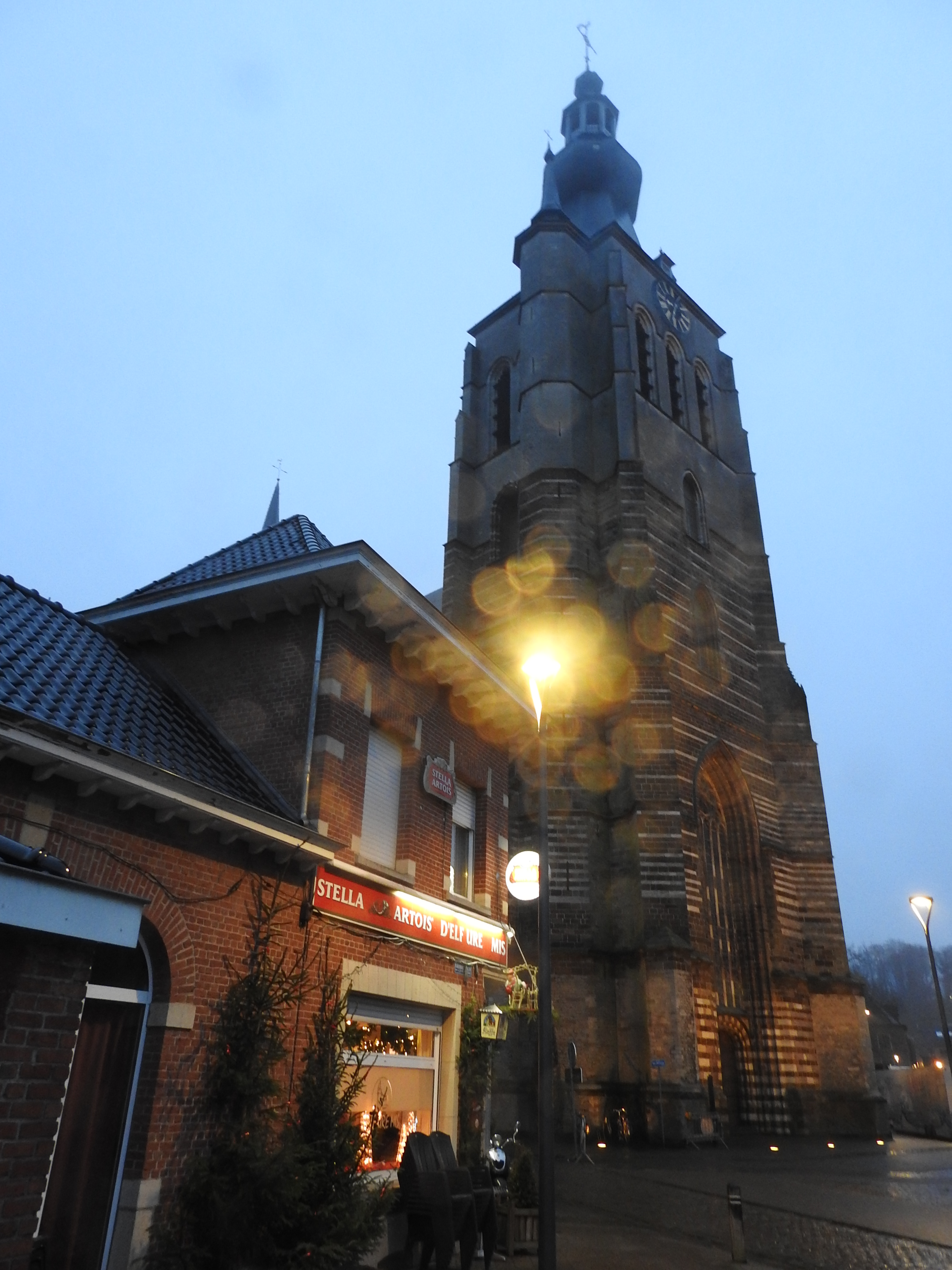 De imposante Onze-Lieve-Vrouwetoren van Aarschot bij valavond. De toren werd gebouwd in de eerste helft van de 15de eeuw.